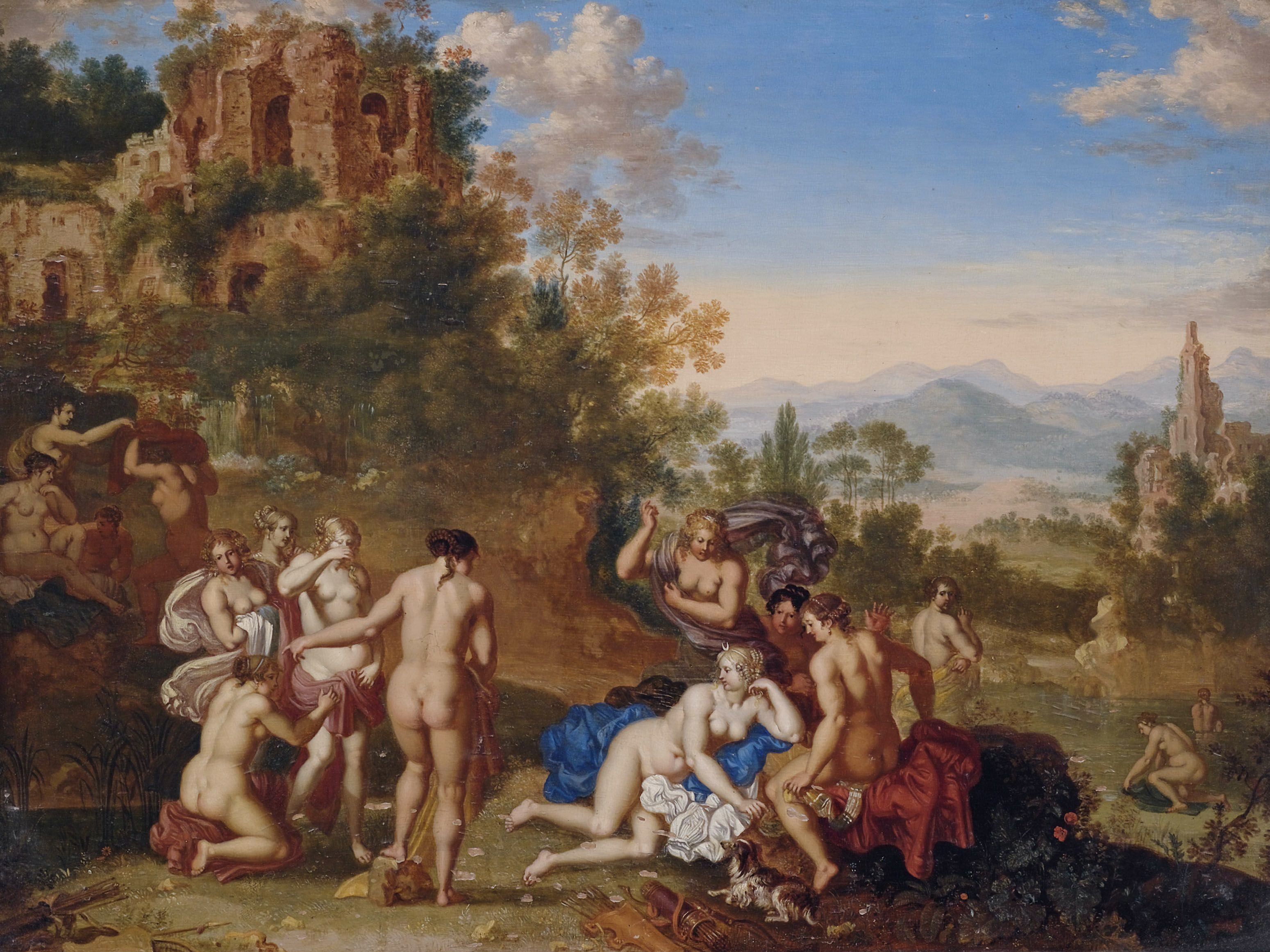 Diana und ihre Nymphen entdecken die Schwangerschaft Callistos.